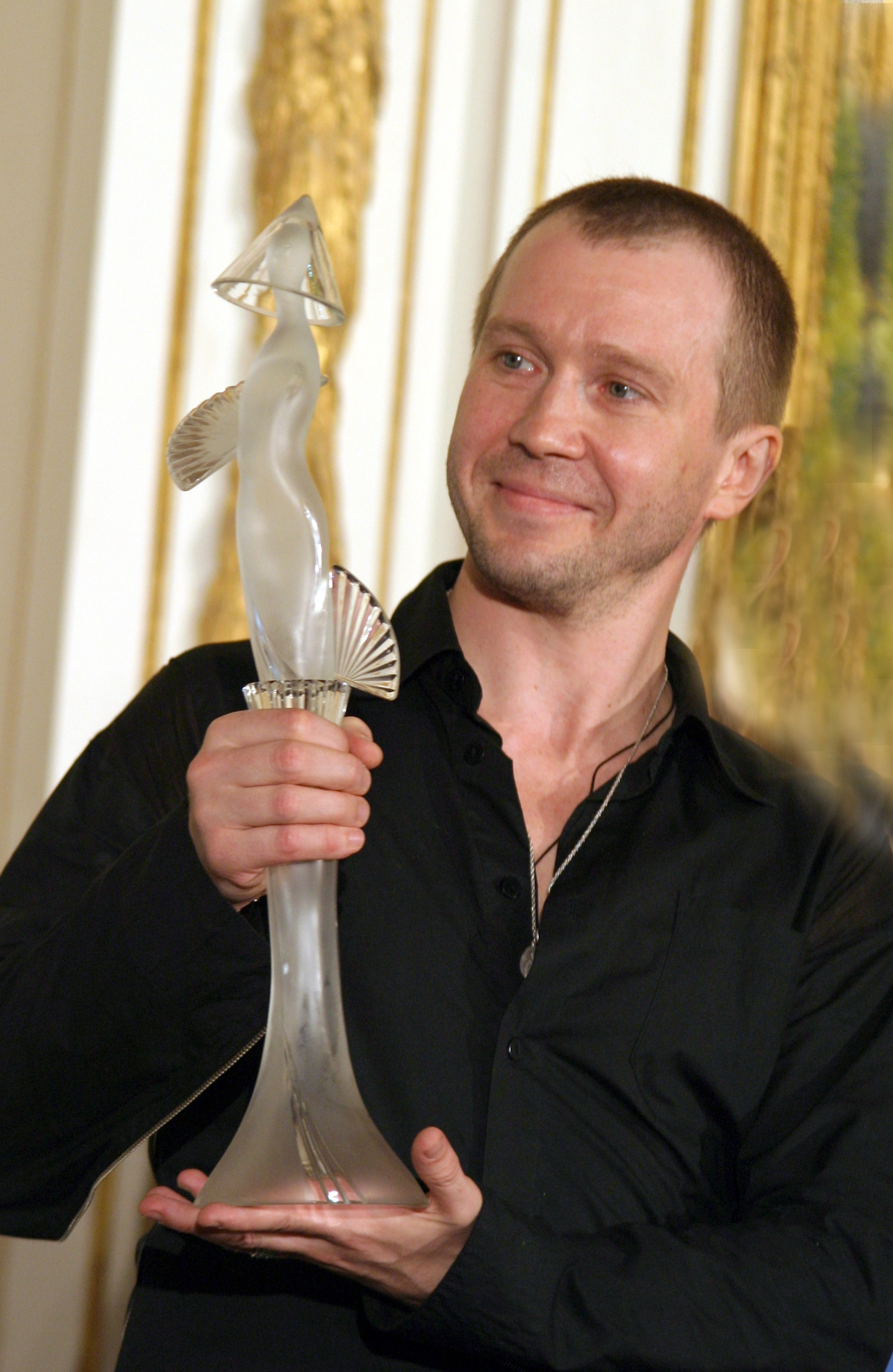 Евгений Миронов на церемонии вручения премии "Хрустальная турандот" в 2006 г.